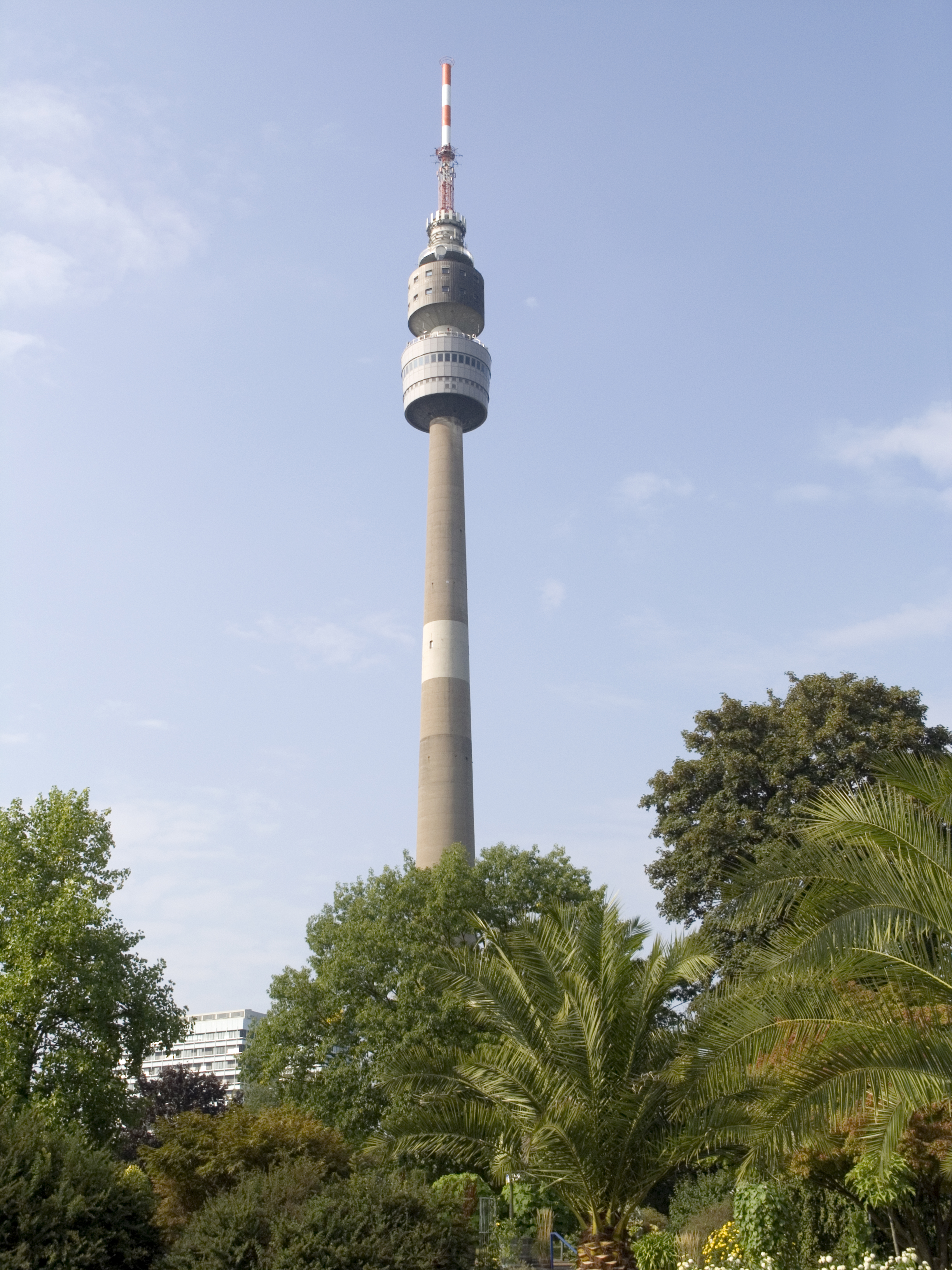 Северный Рейн-Вестфалия, Дортмунд - телебашня Florianturm